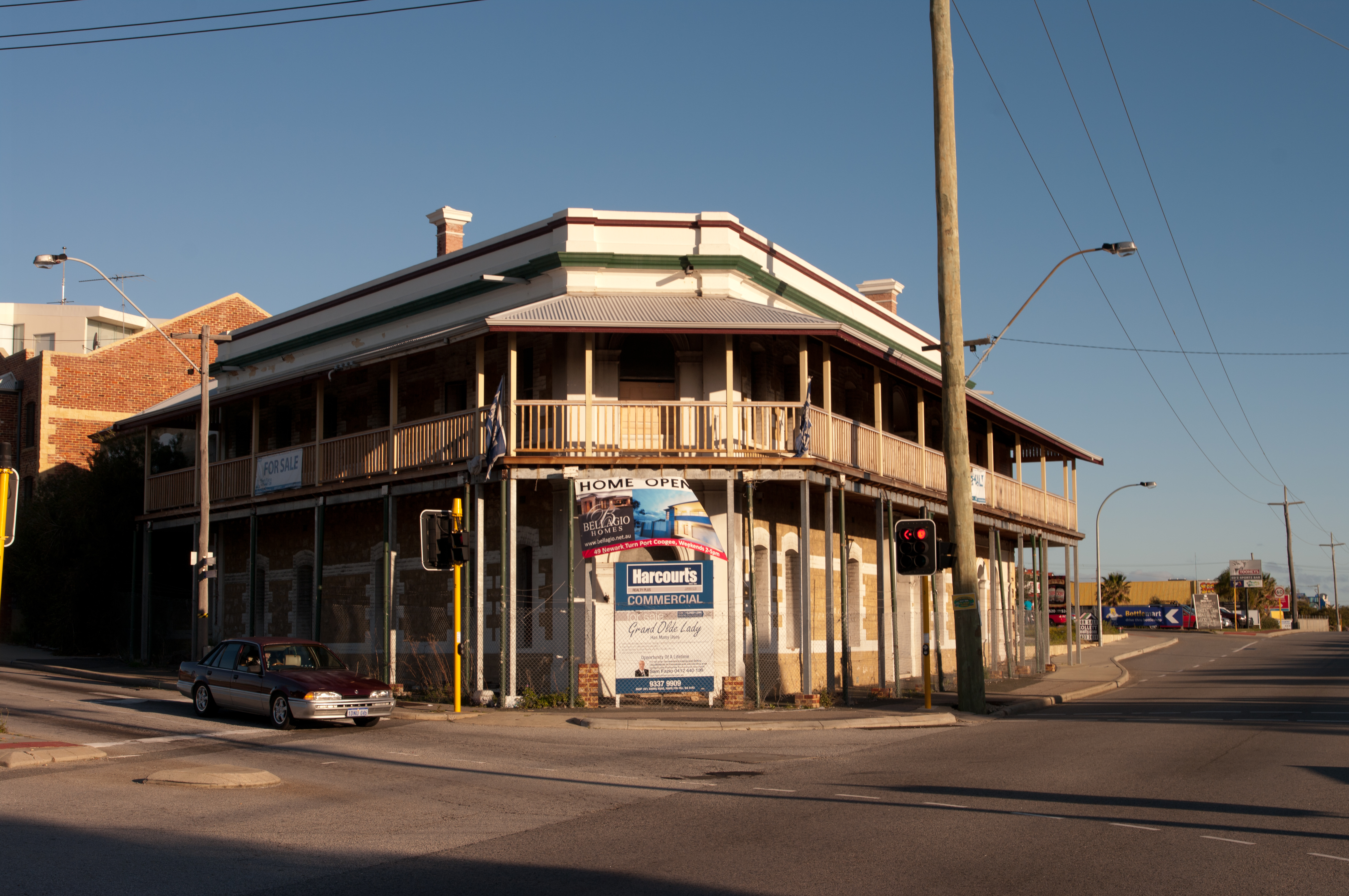 Newmarket hotel